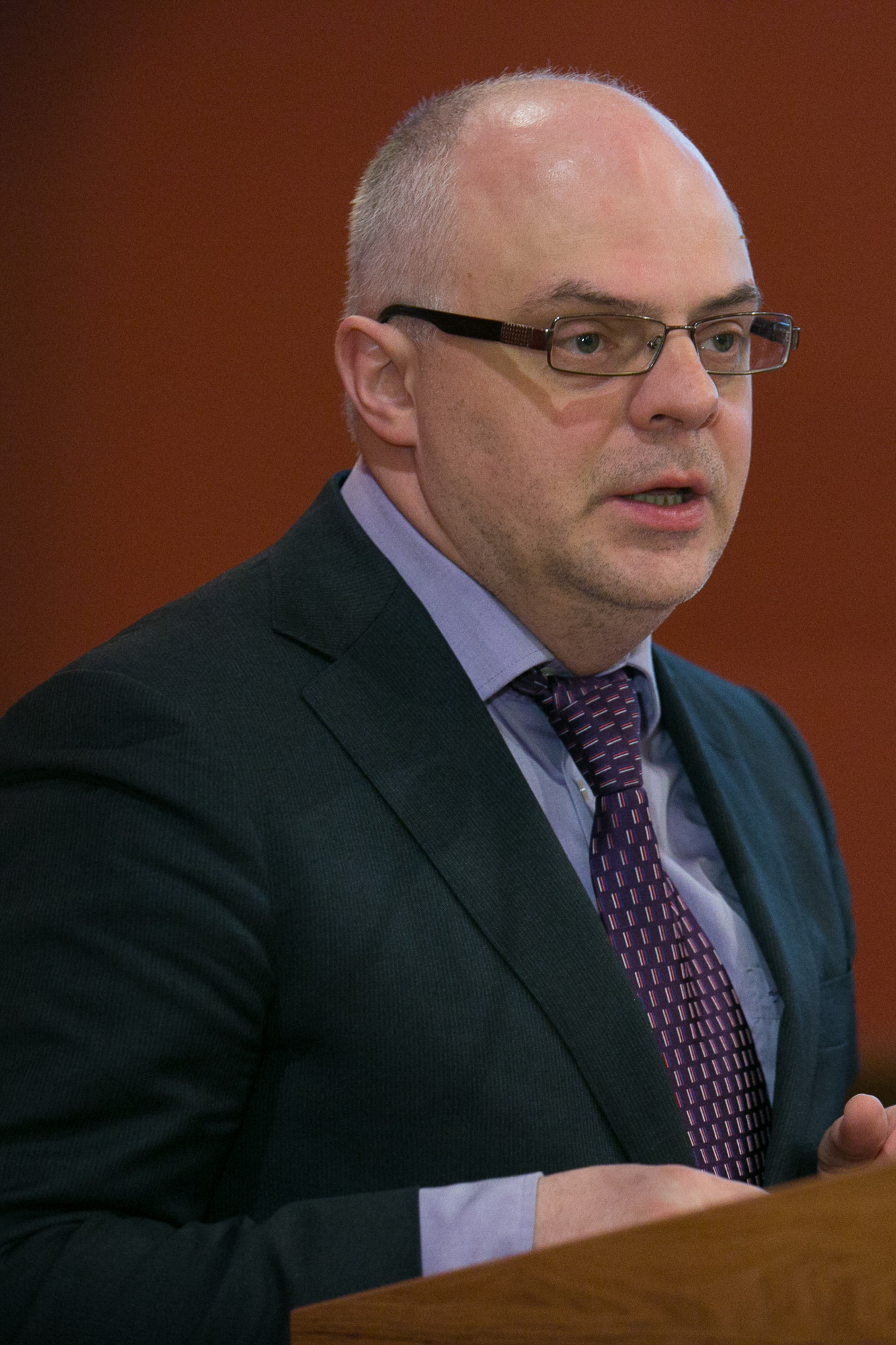 Roberts Ķīlis